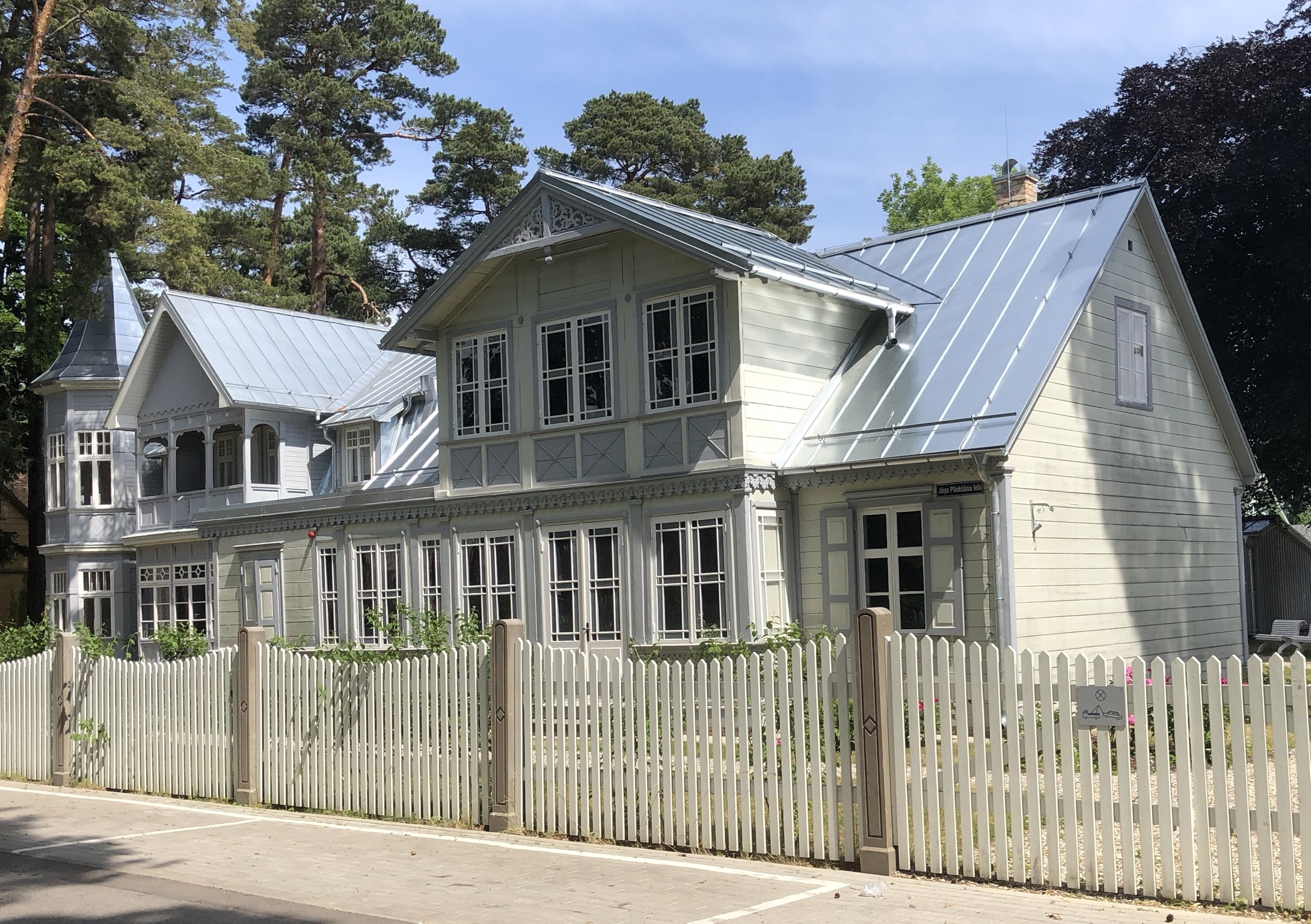 Rainis-Museum in Majorenhof